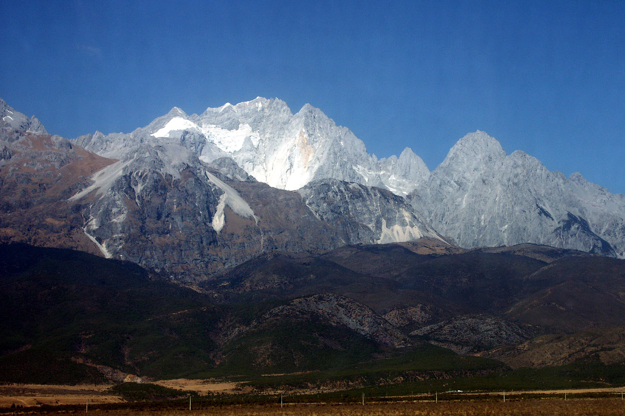 Yunlong Mount(5596m)，near Lijiang, Yunnan, China